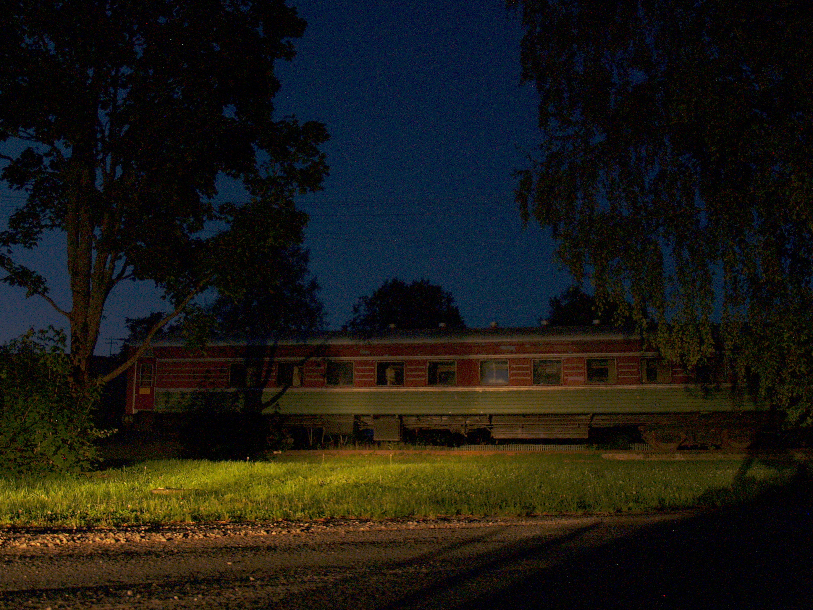 Mõisaküla raudteevagun.